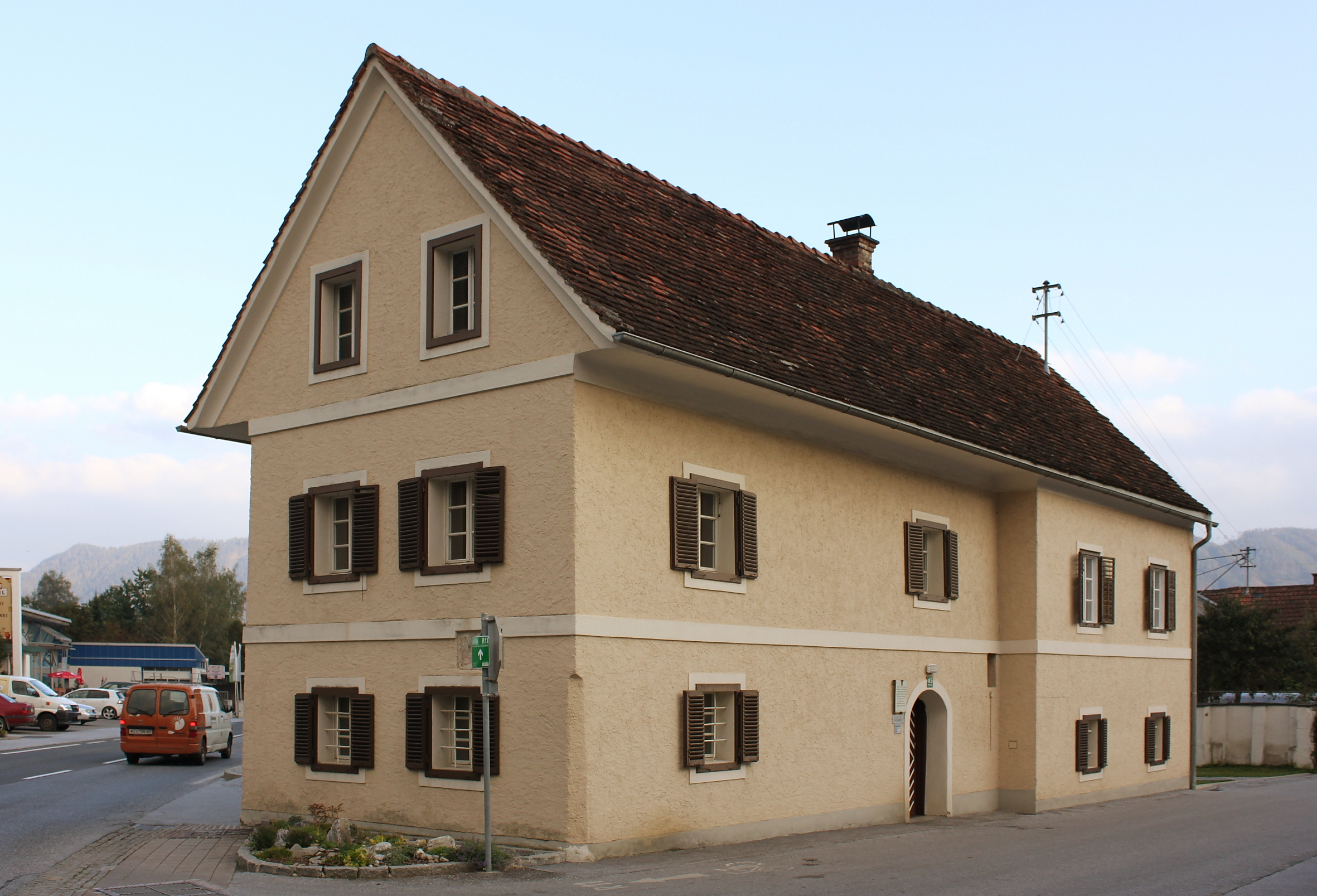 Passail Nr. 45, sogenannte Nagelschmiede, Hofhaus der Stubenberger, ehemaliges Armenhaus und Herberge, heute Öffentliche Bibliothek der Marktgemeinde